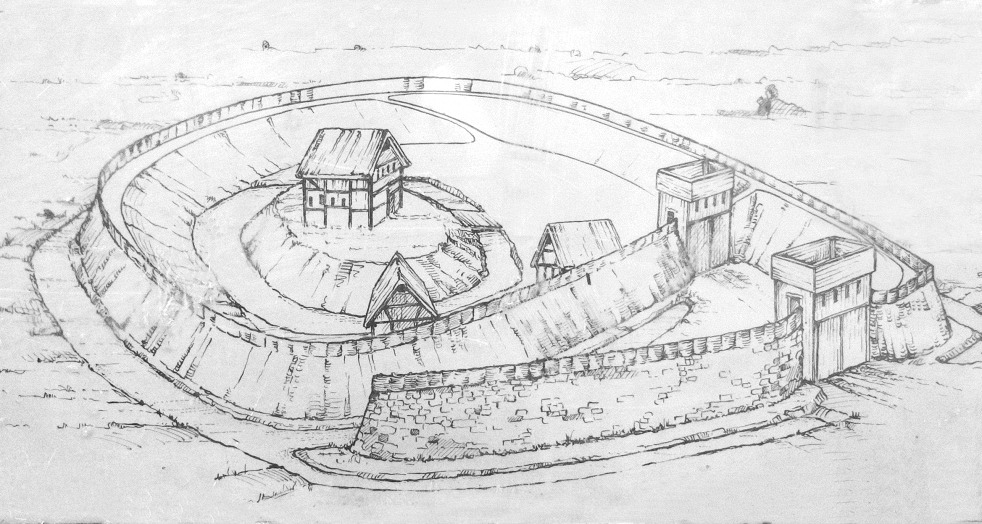 Rekonstruktion der Burg Heeßel auf einem Schild an der Burgstelle